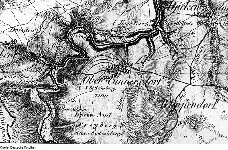 Original image description from the Deutsche Fotothek Höckendorf-Obercunnersdorf. Oberreit, Sect. Dresden, 1821/22